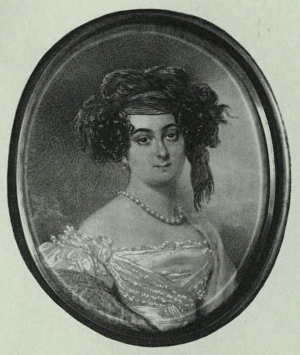 Графиня Екатерина Росетти-Розновано, урожденна княжна Гика (1785—1870), первая жена Николая Георгиевича Росетти-Рознован (1794—1858); хозяйка усадьбы в Липканах в Бессарабии. У них было три дочери: Роксандра (зам. за Мих. Ник. Сабуровым), Мария (1815—1899; в замуж Соллогуб) и Пульхерия (в зам. за Фёдором Константиновичем Розеном) — выпускницы Смольного института.